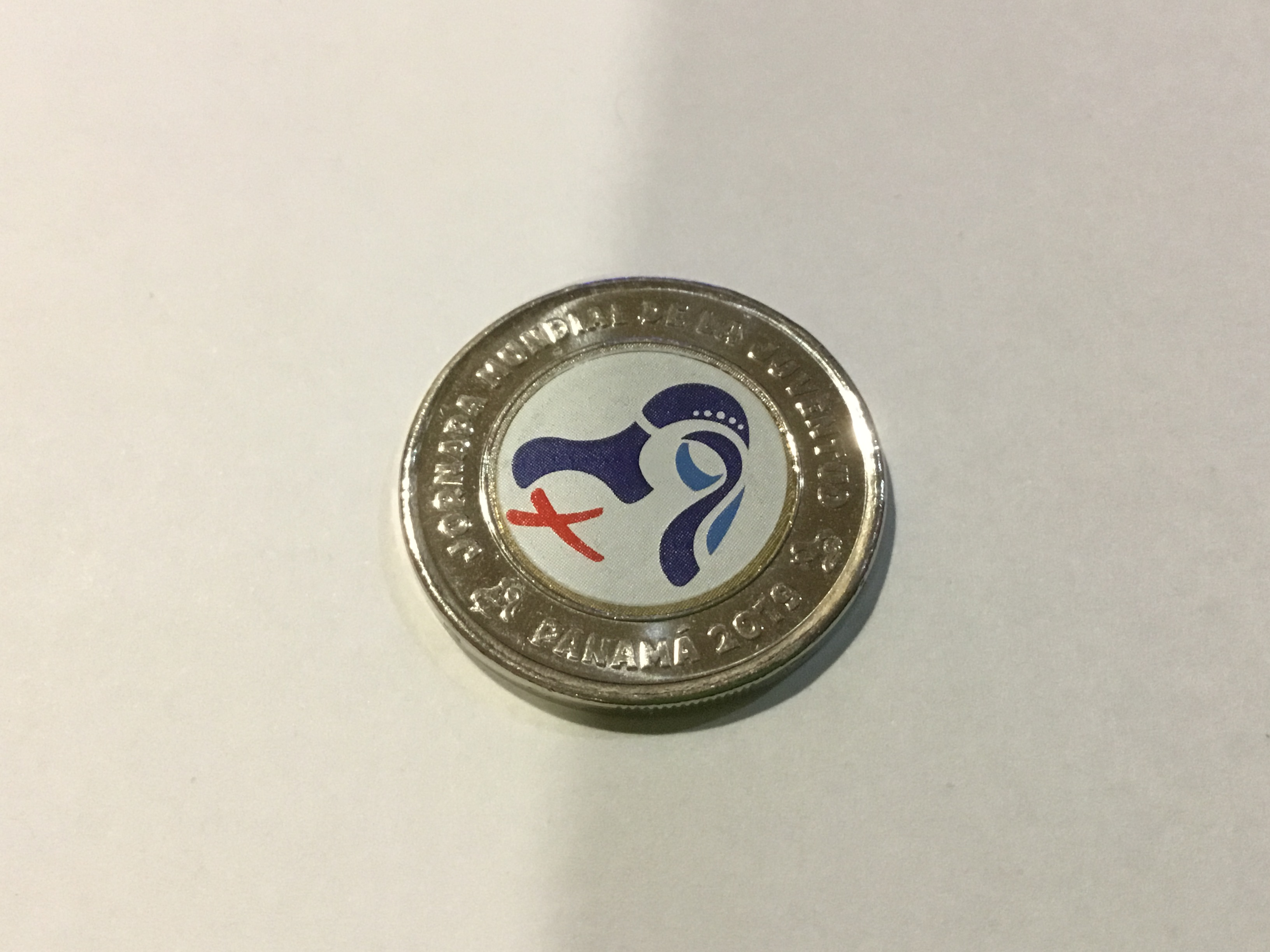 Balboa conmemorativo a la Jornada Mundial de la Juventud